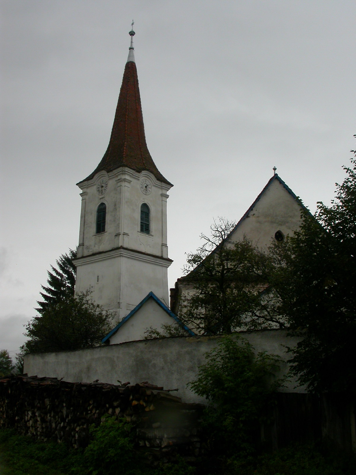 Ansamblul bisericii unitariene din Ocland, sec. XIII-XX